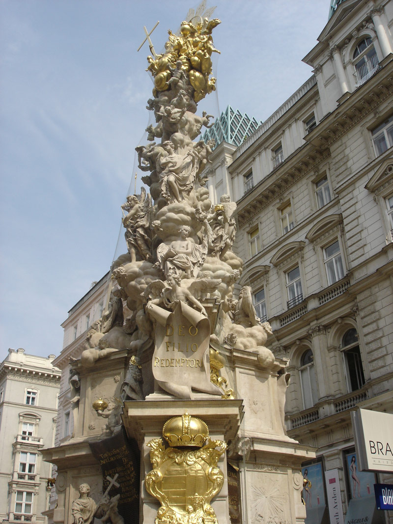 Pestsäule, Vienna